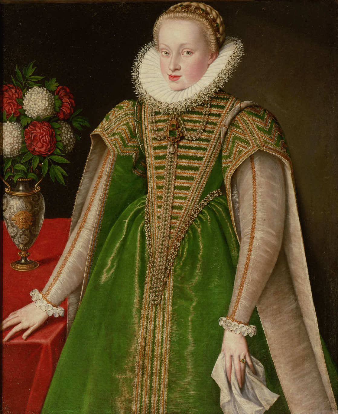 Erzherzogin Maria Christina (1574-1621) in grünem Gewand, Kniestück